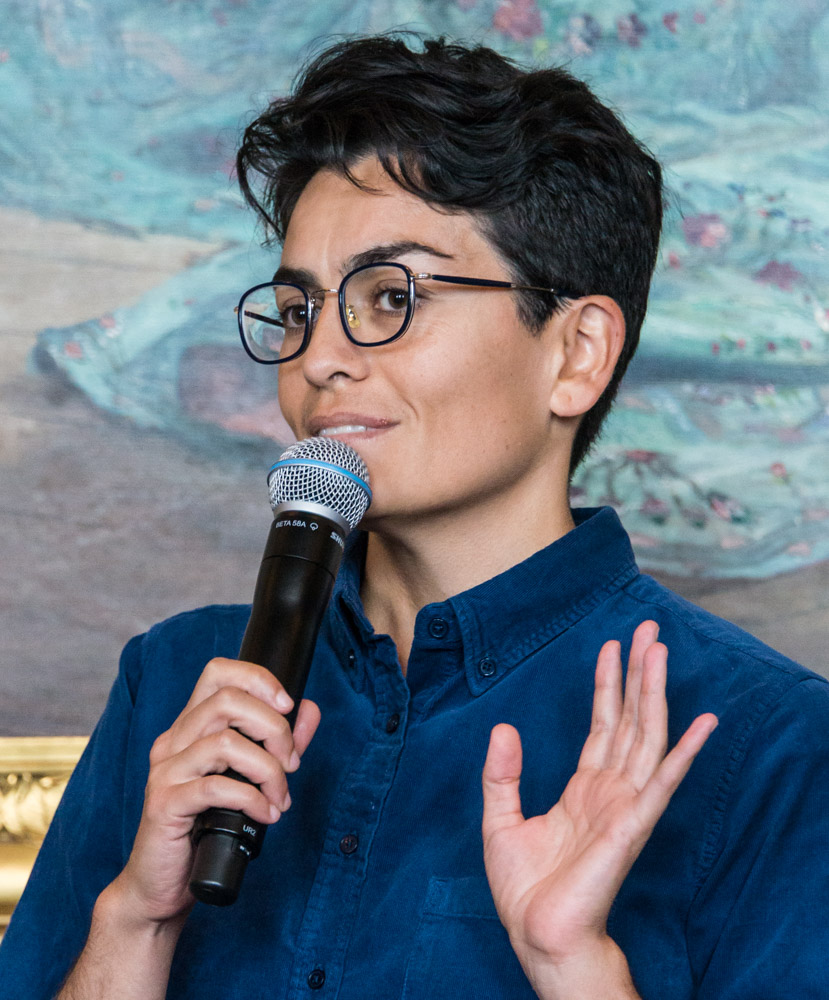 Lawen Mohtadi under Dramatens höstsamling den 18 augusti 2015.